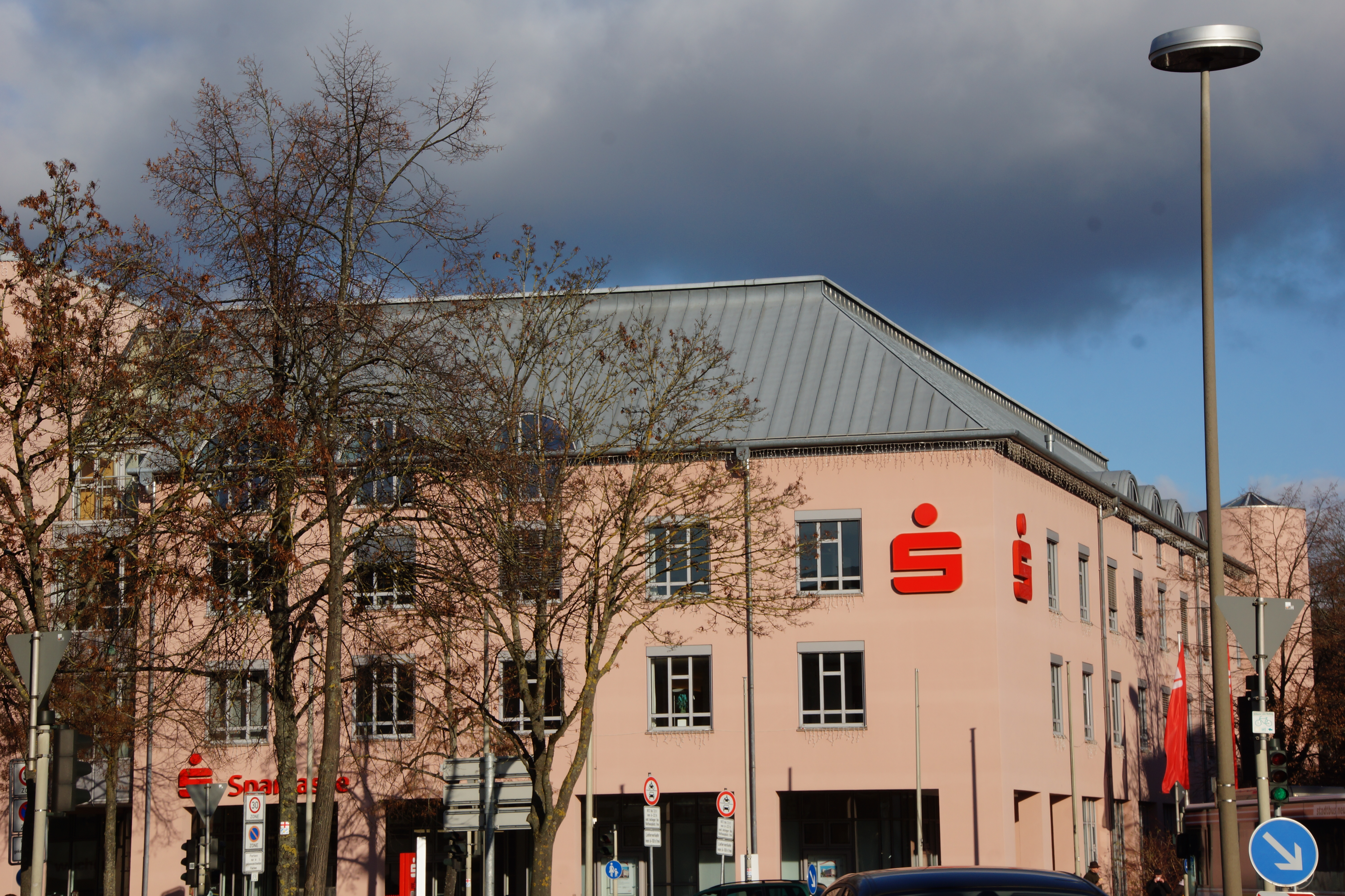 Neumarkt Oberpfalz - früher Oberes Tor / jetzt Theo-Betz-Platz